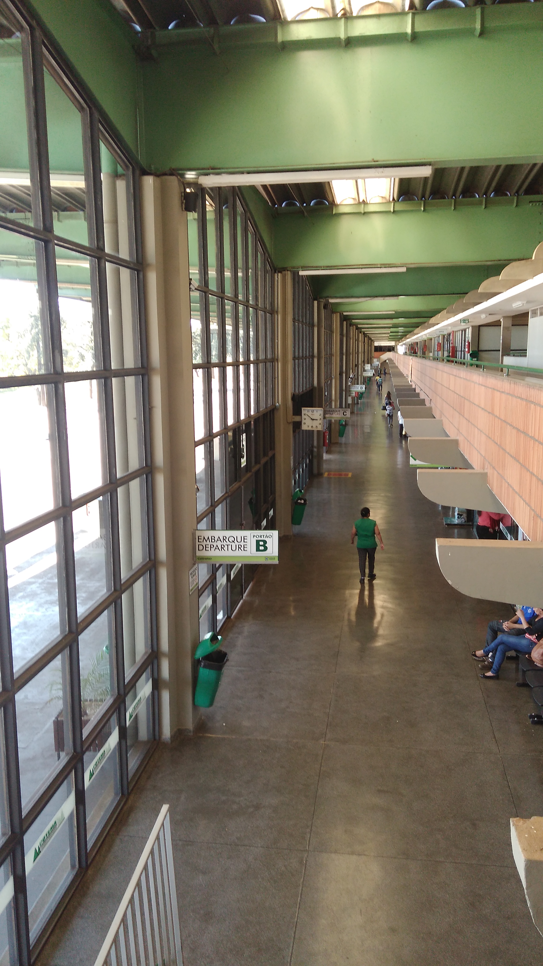 Rodoviária de Cascavel (Paraná).